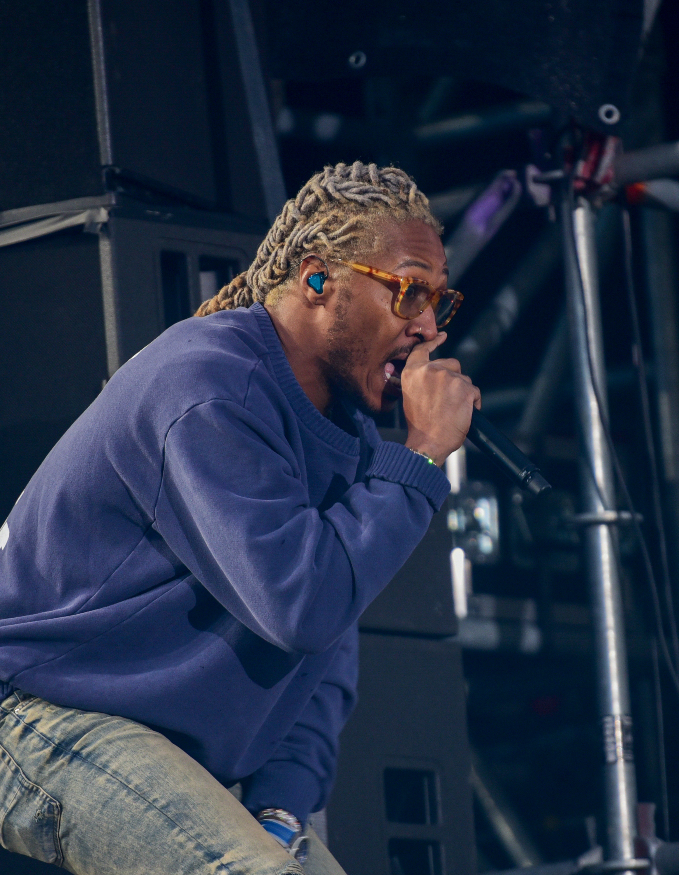 Future live auf dem Openair Frauenfeld 2019